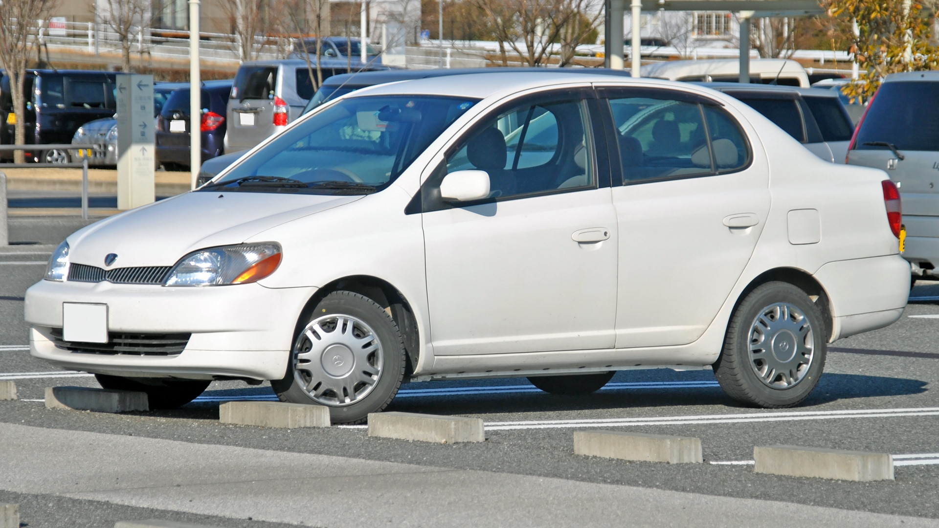 トヨタ・プラッツ（前期型）